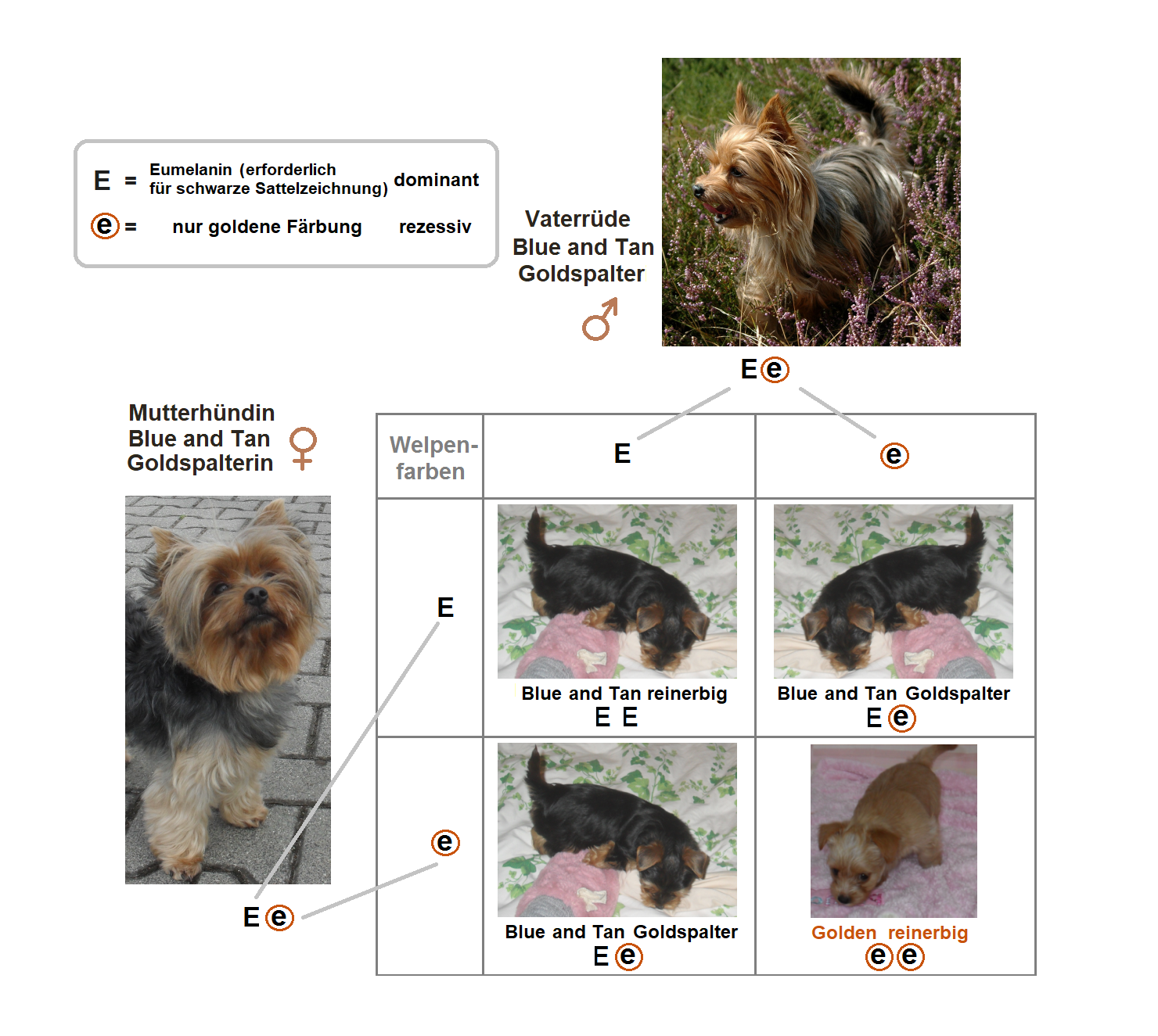 Erbschema: Verpaarung zweier Anlageträger des rezessiven Allels e beim Yorkshire Terrier